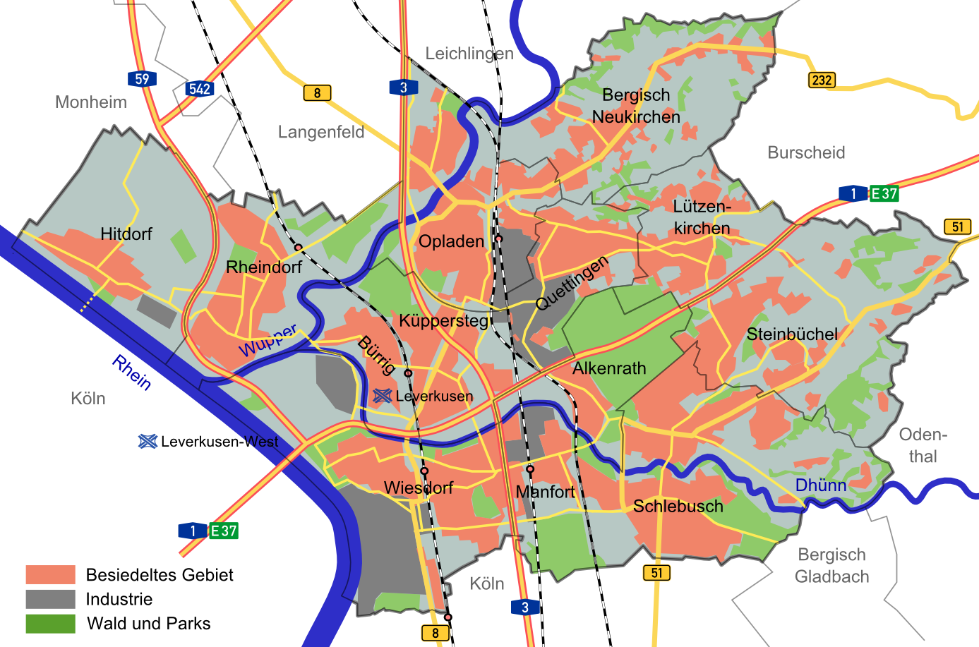 Karte der Stadt Leverkusen Leverkusener im Jahre 2007.